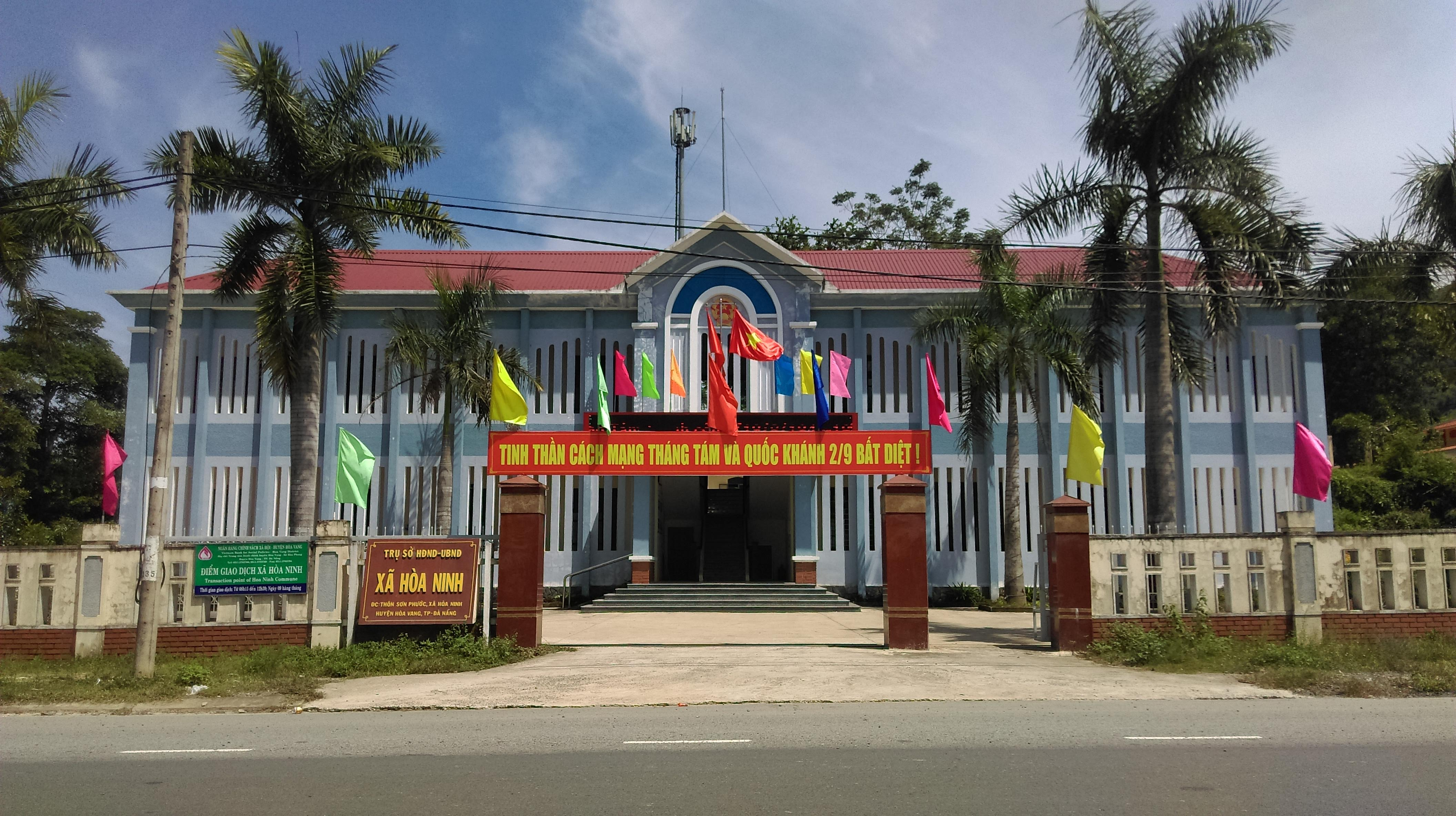 UBND xã Hòa Ninh, Hòa Vang, Đà Nẵng